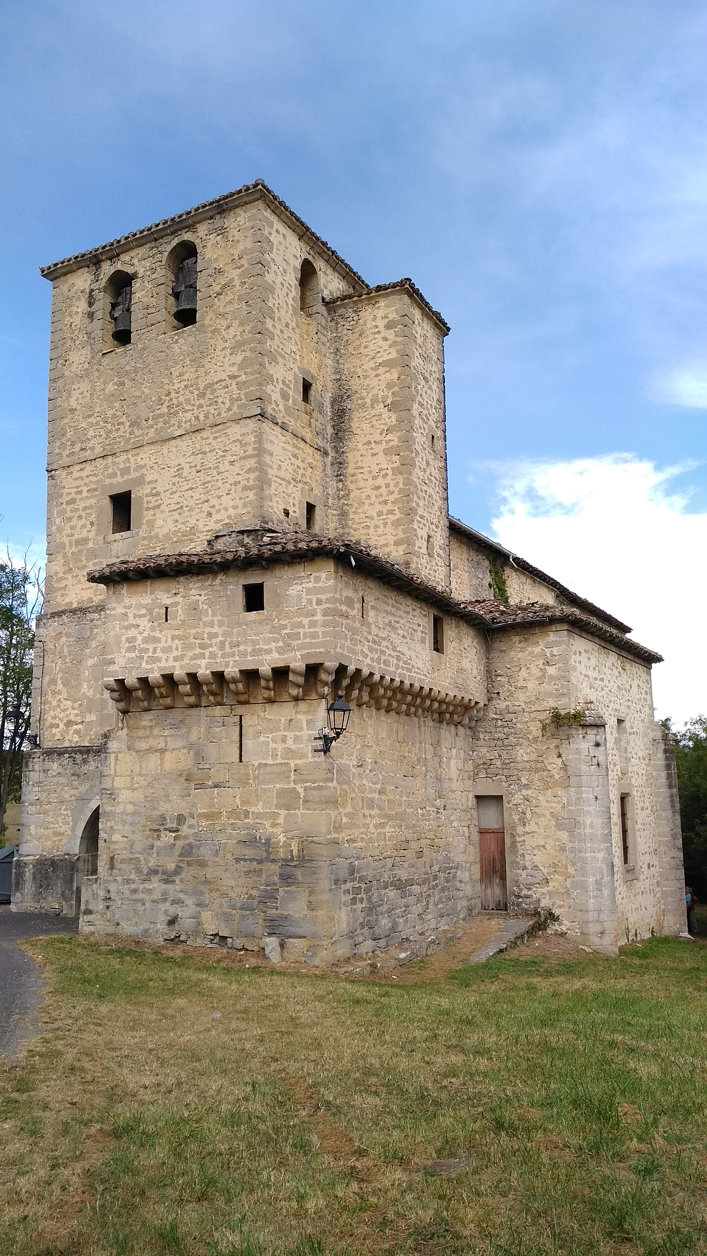 Soxo herriko eliza